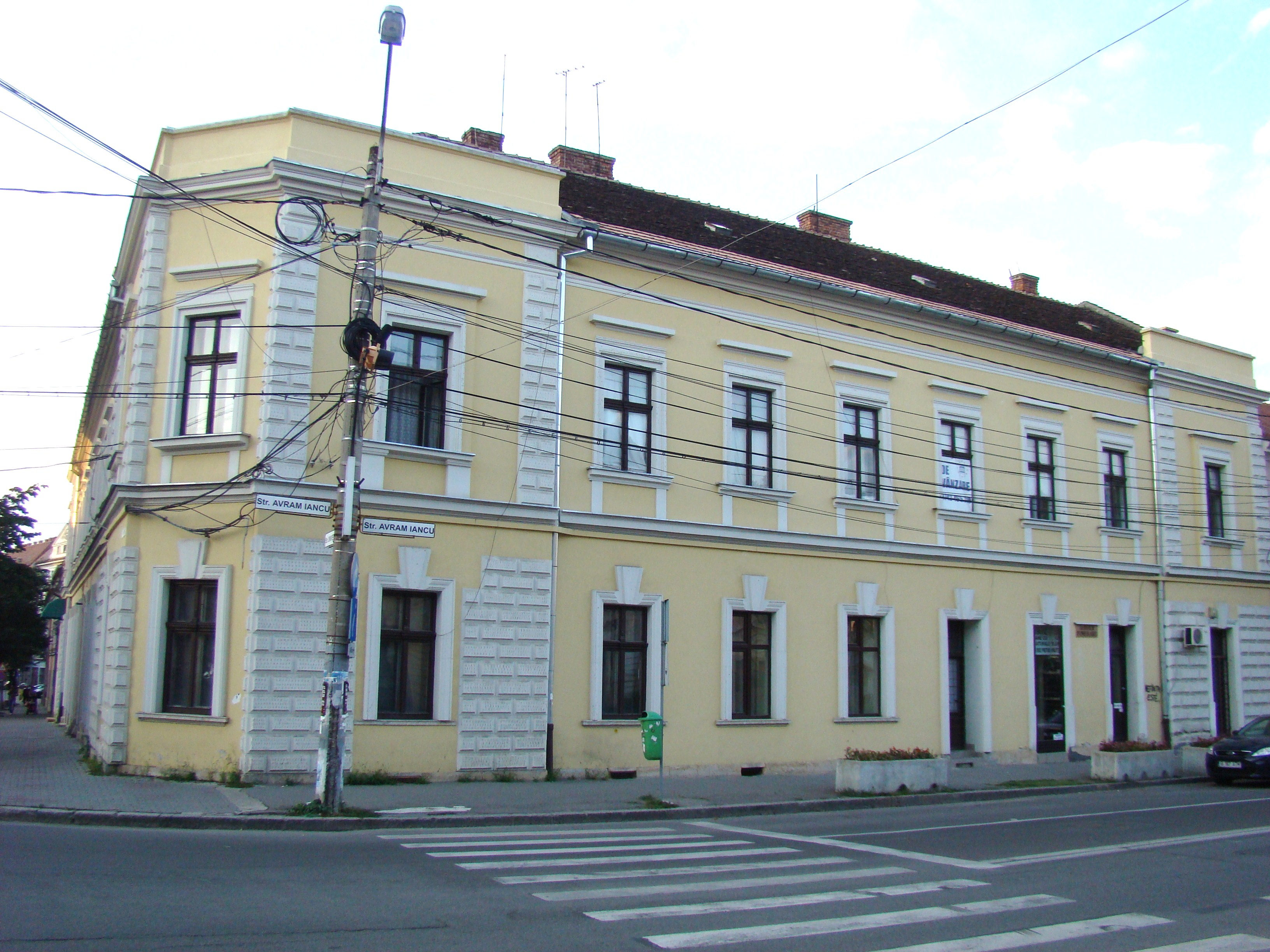 Cluj-Napoca, str.Avram Iancu, nr.13